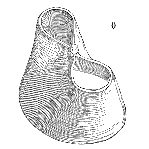 ... Au XIIe siècle, d'après Théophile, les plaques de verre étaient obtenues à l'aide de deux procédés qu'on n'emploie plus de nos jours. Avec la canne à souffler, l'ouvrier cueillait dans le creuset une masse de verre incandescent; il soufflait de manière à obtenir une bouteille en forme de vessie allongée. Approchant l'extrémité de cette vessie de la flamme du fourneau, cette extrémité se liquéfiait et se perçait. Avec un morceau de bois, l'ouvrier dilatait cette ouverture de façon qu'elle arrivât au diamètre le plus large de la vessie. Alors de ce cercle inférieur, en rapprochant les deux bords opposés, il formait un huit. Le verre, ainsi préparé, était détaché de la canne au moyen du frottement d'un morceau de bois humide sur le col de la bouteille. Faisant chauffer l'extrémité de la canne au four, avec les parcelles de verre incandescent qui y tenaient encore, il collait le bout de la canne au milieu du huit. L'extrémité supérieure de la bouteille était alors présentée à la flamme; puis on opérait comme précédemment en élargissant l'ouverture. Le morceau de verre ainsi disposé, on le séparait de la canne et on le portait au four de refroidissement. Ces verres, qui avaient la forme que donne la figure 0, étaient remis au feu pour être dilatés, fendus et aplanis ...